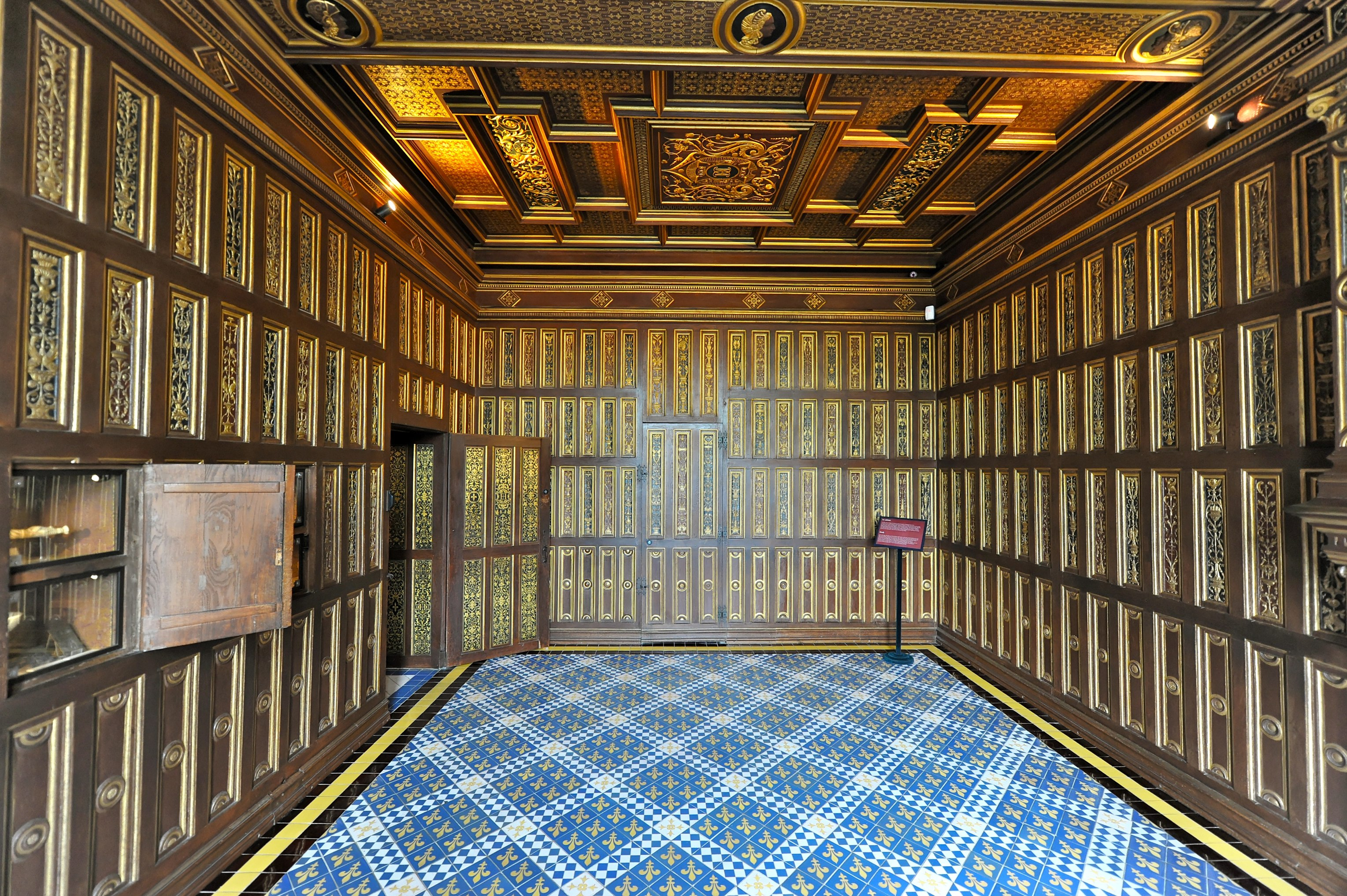 Schloss Blois - Kabinett Katharinas von Medici